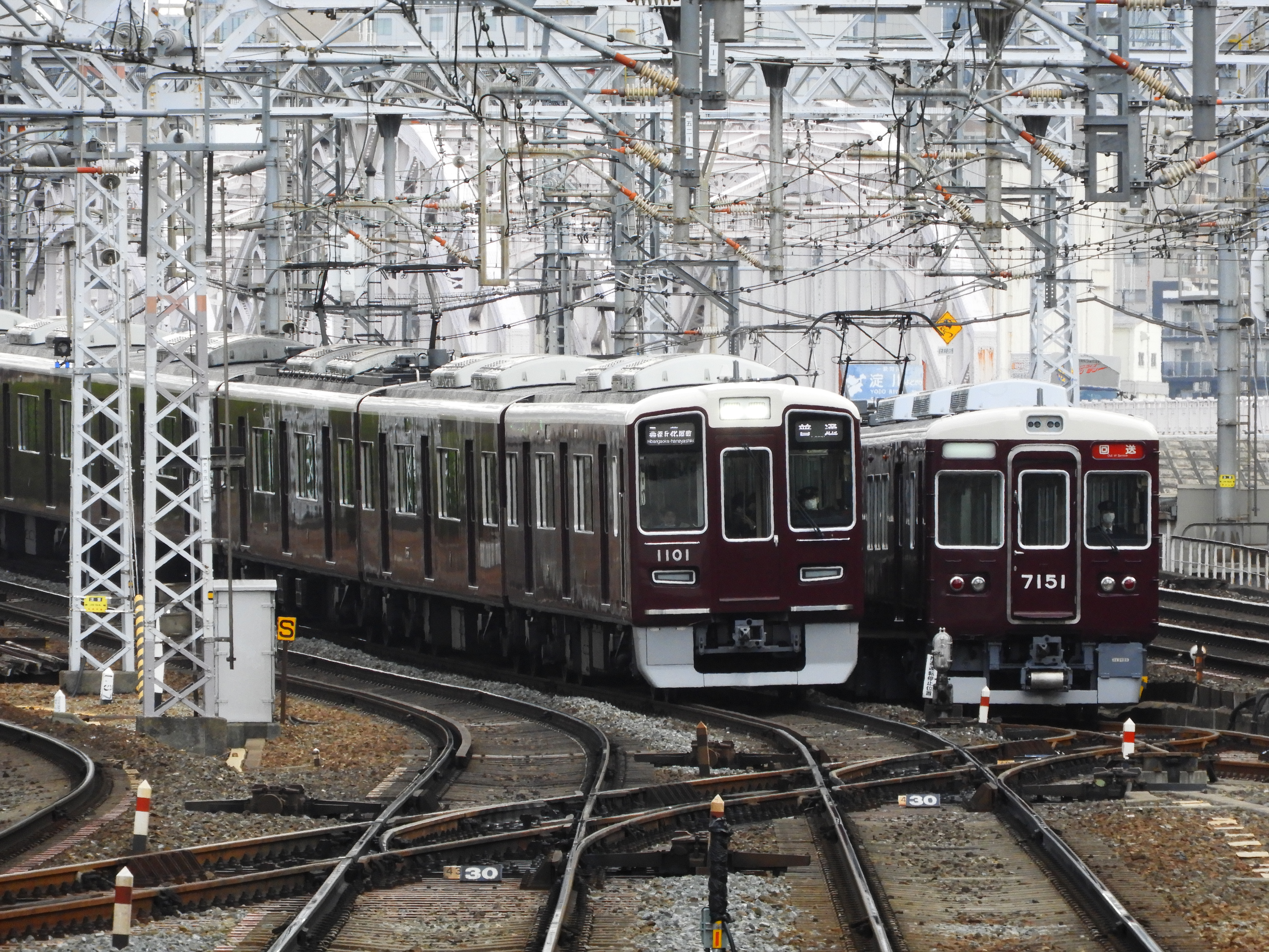 阪急十三駅の引き上げ線(9号線)を使って折り返す回送列車(右) Nikon Coolpix B700